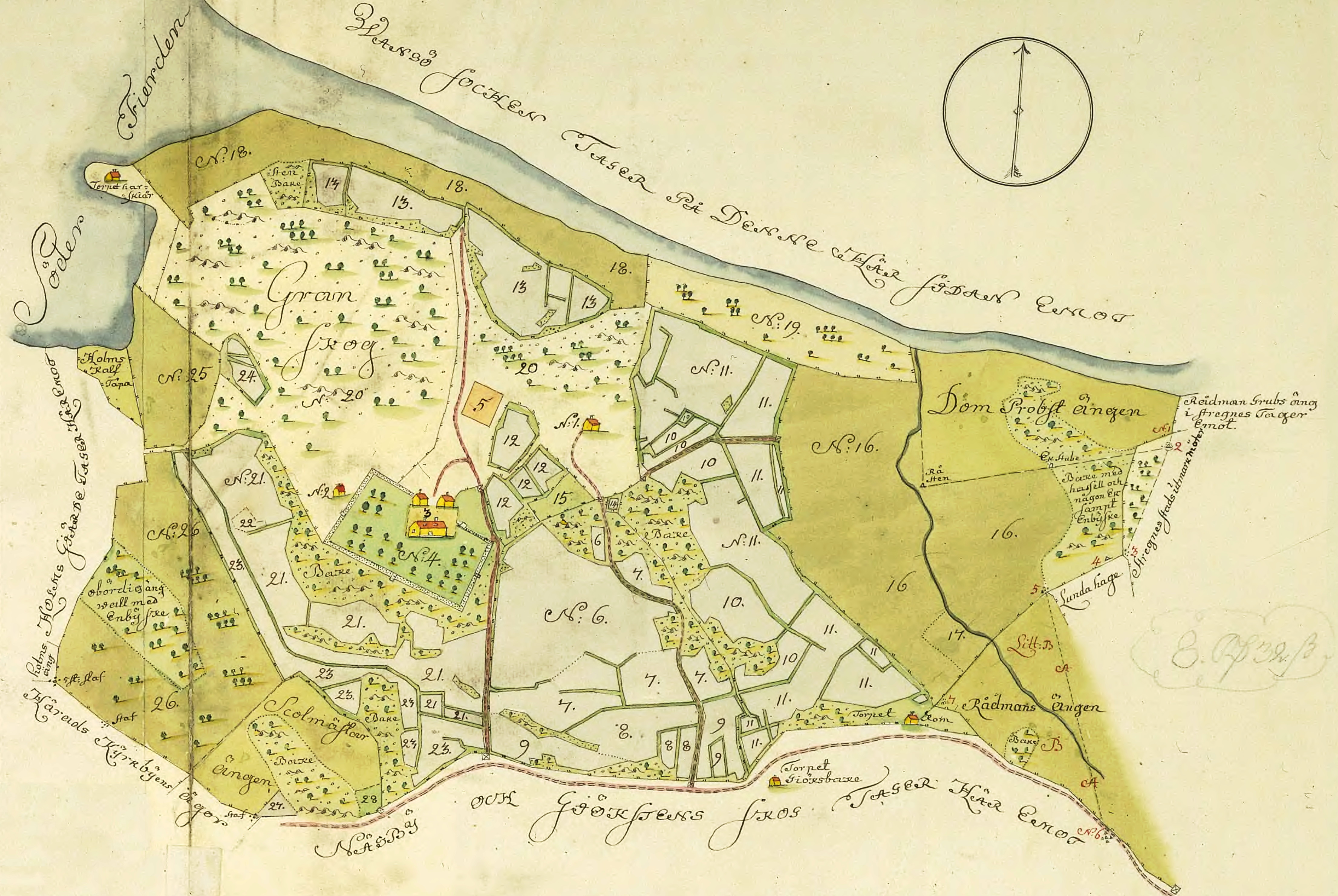 Karta över Näsbyholms säteri